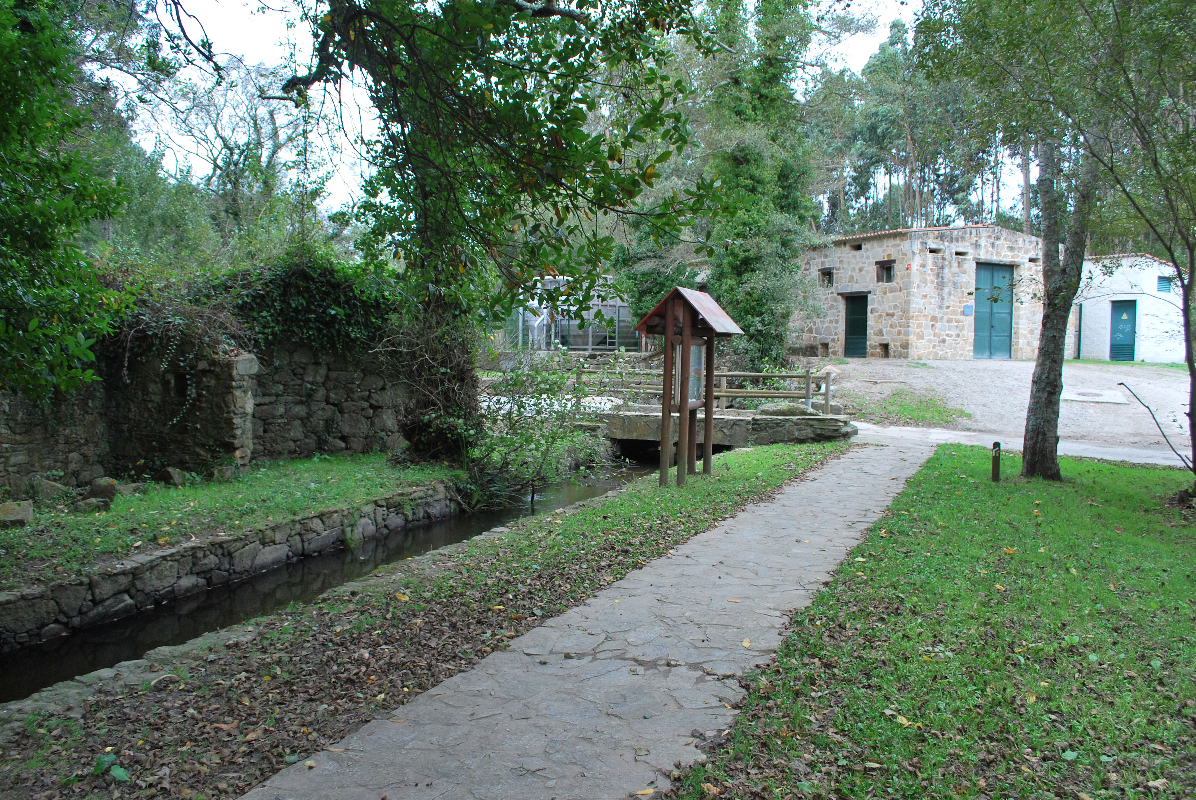 Vista do río Sisalde e ETAP Barrañán Arteixo A Coruña Galiza